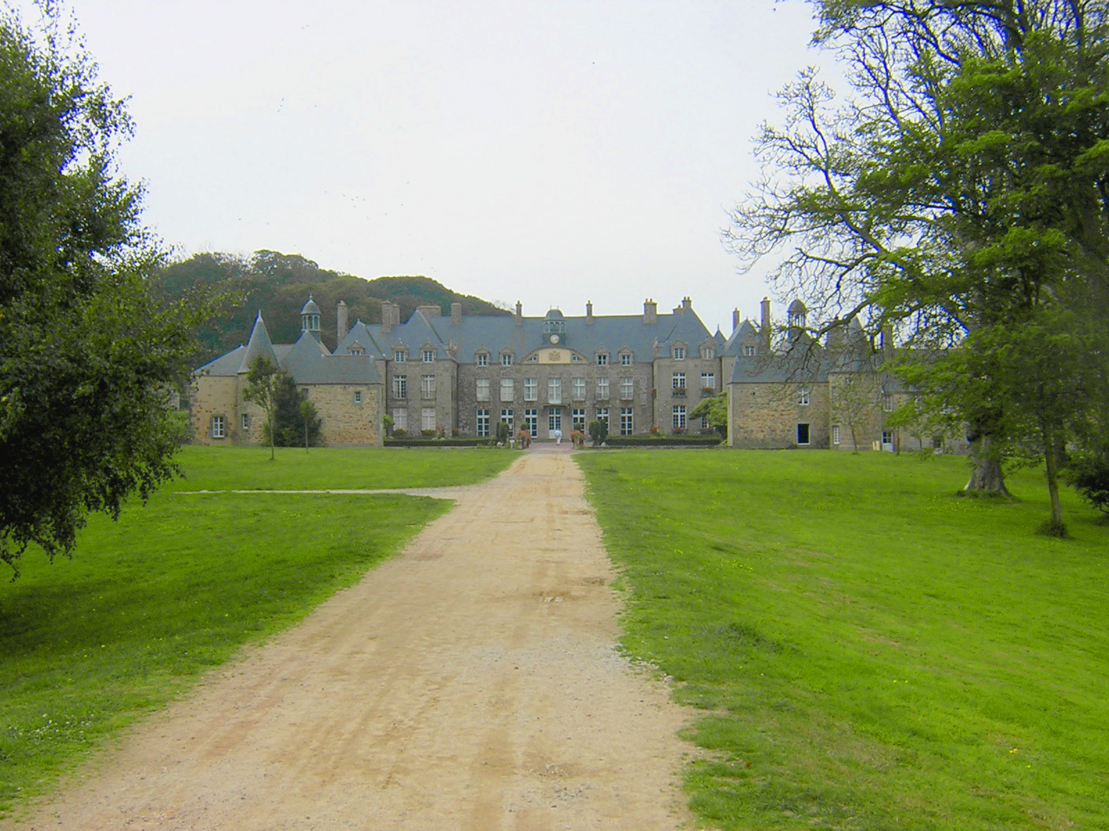 Château de Flamanville, Manche, France